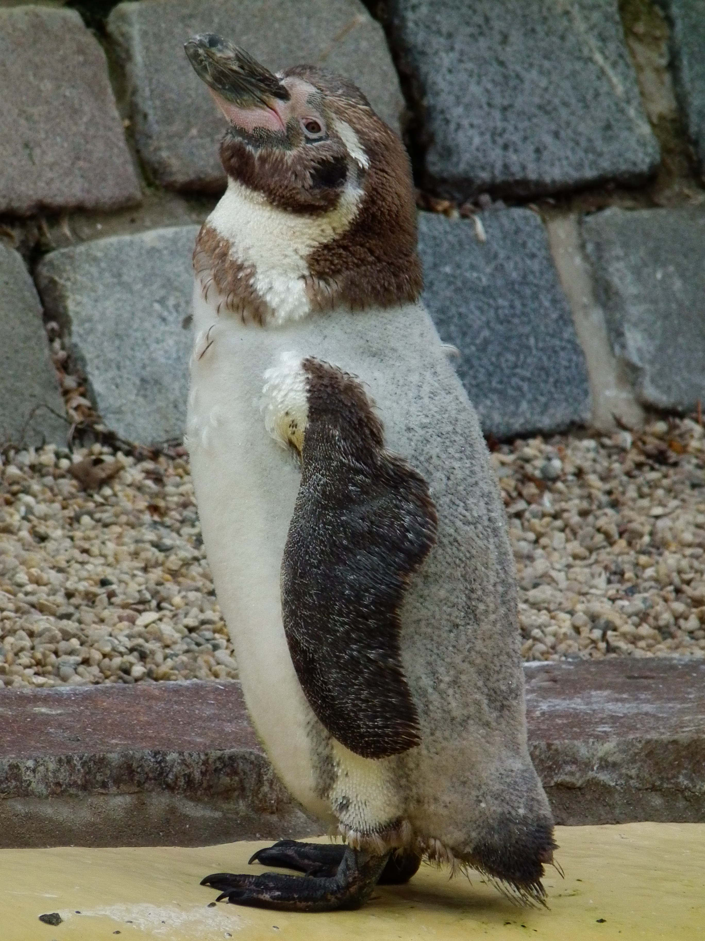 Humboldt-Pinguins (Spheniscus humboldti) in der Mauser